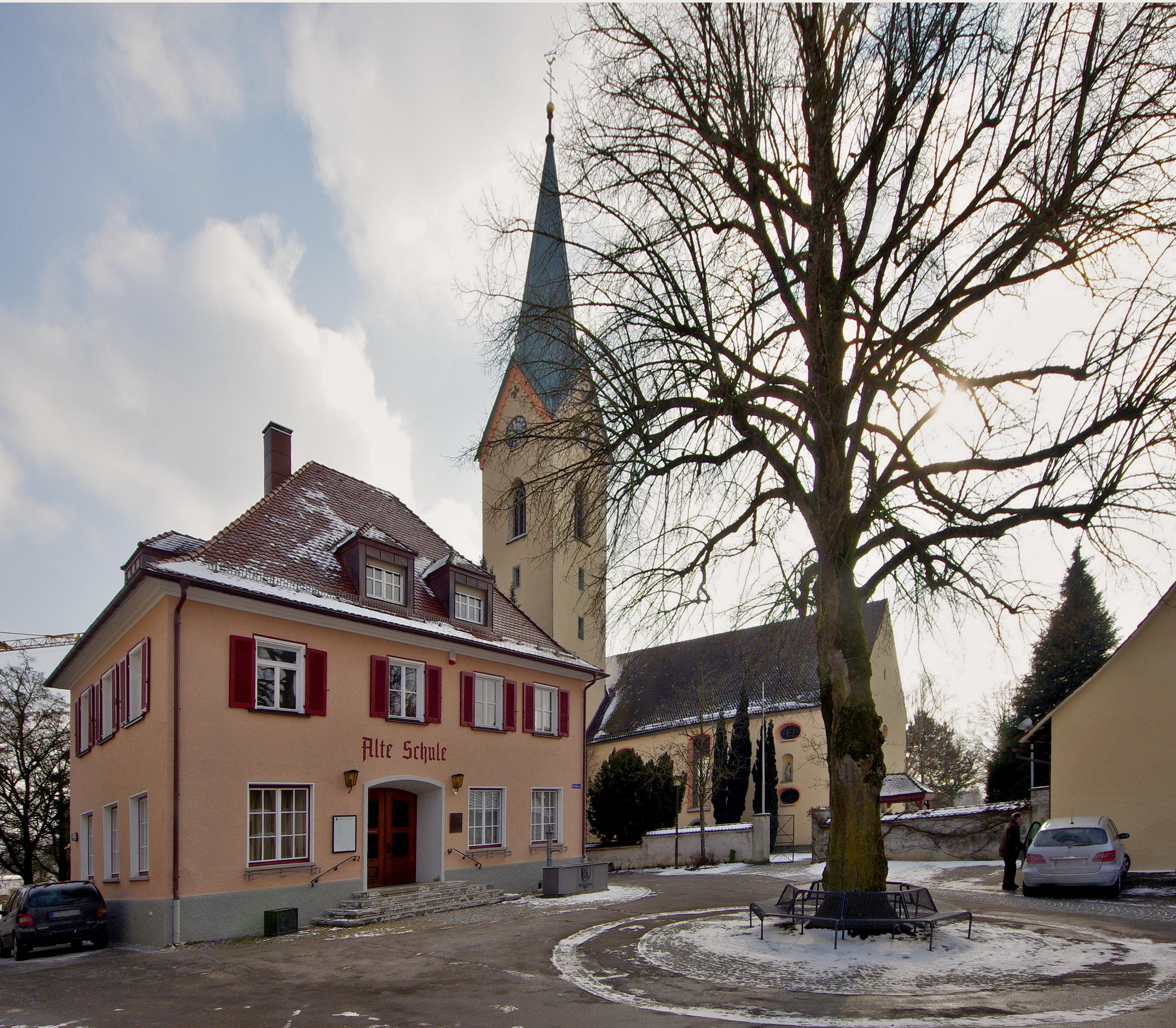 Eriskirch, Mariä Hilf, Außenansicht der Kirche mit der alten Schule